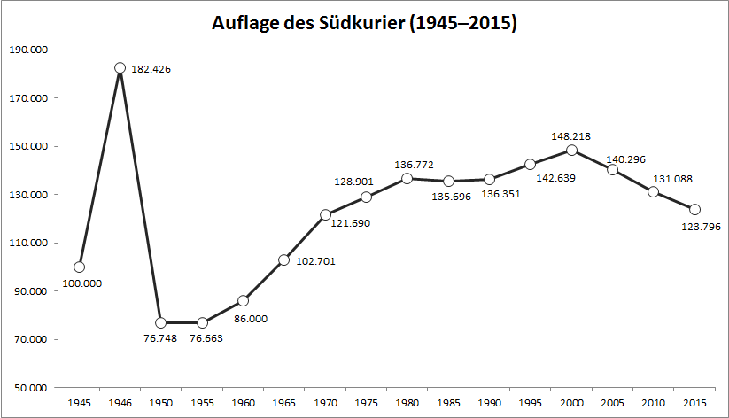 Auflagenentwicklung der Tageszeitung Südkurier von 1945 bis 2015